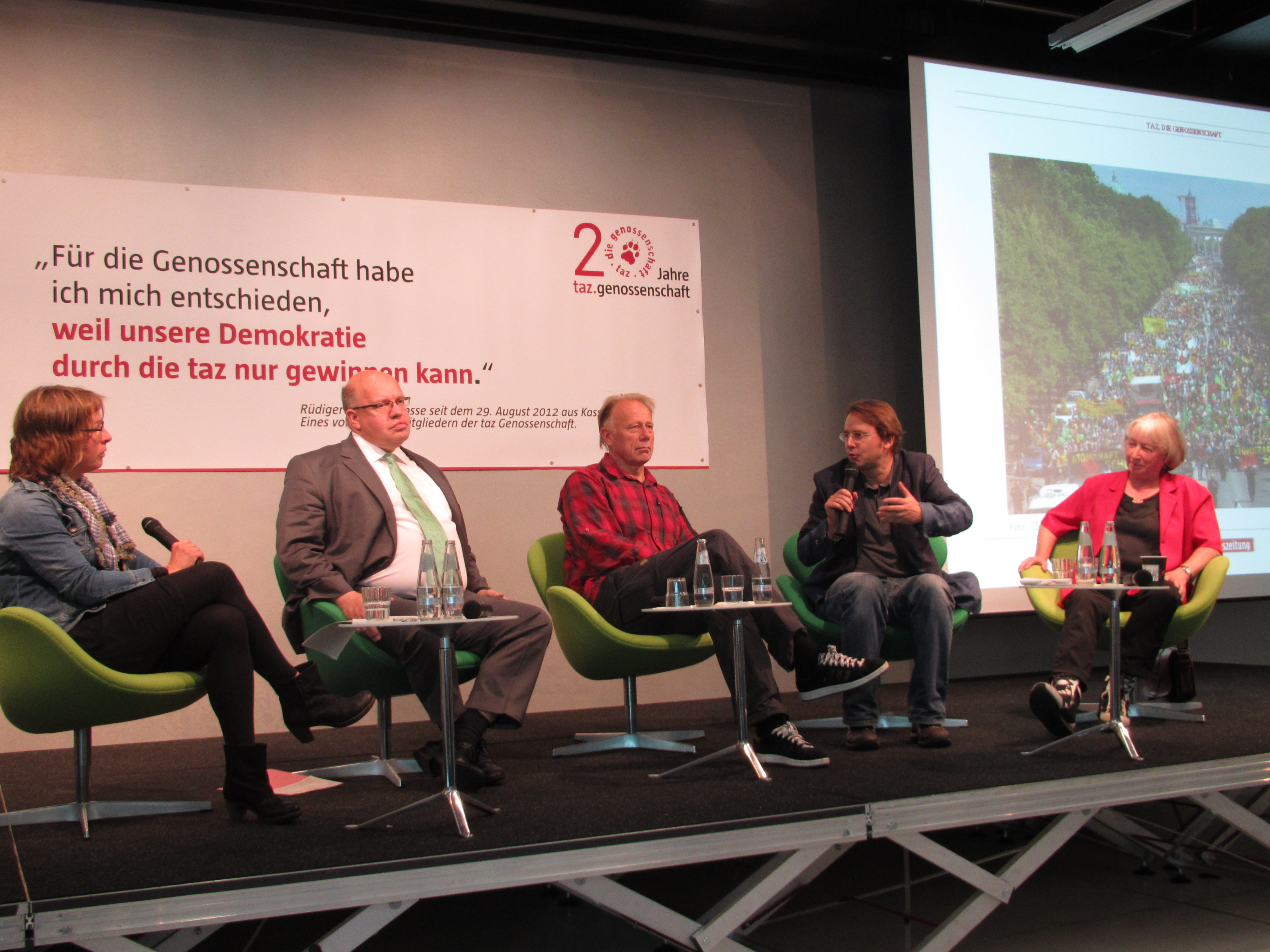 taz-Veranstaltung: "Machen und Nerven: Was die Energiewende von uns verlangt" Samstag, den 15.09.2012, 10:30 Uhr bis 12:00 Uhr Schumannstraße 8, 10117 Berlin (v.l.n.r.): Moderation: Hanna Gersmann, Leiterin des taz-Inlandsressorts Es diskutieren: Peter Altmaier (Bundesumweltminister, CDU) Jürgen Trittin (Bündnis90/Die Grünen) Martin Unfried (Ökotrainer und taz Genosse) Ursula Sladek (Geschäftsführerin Elektrizitätswerke Schönau) Quelle -Version der Quelle